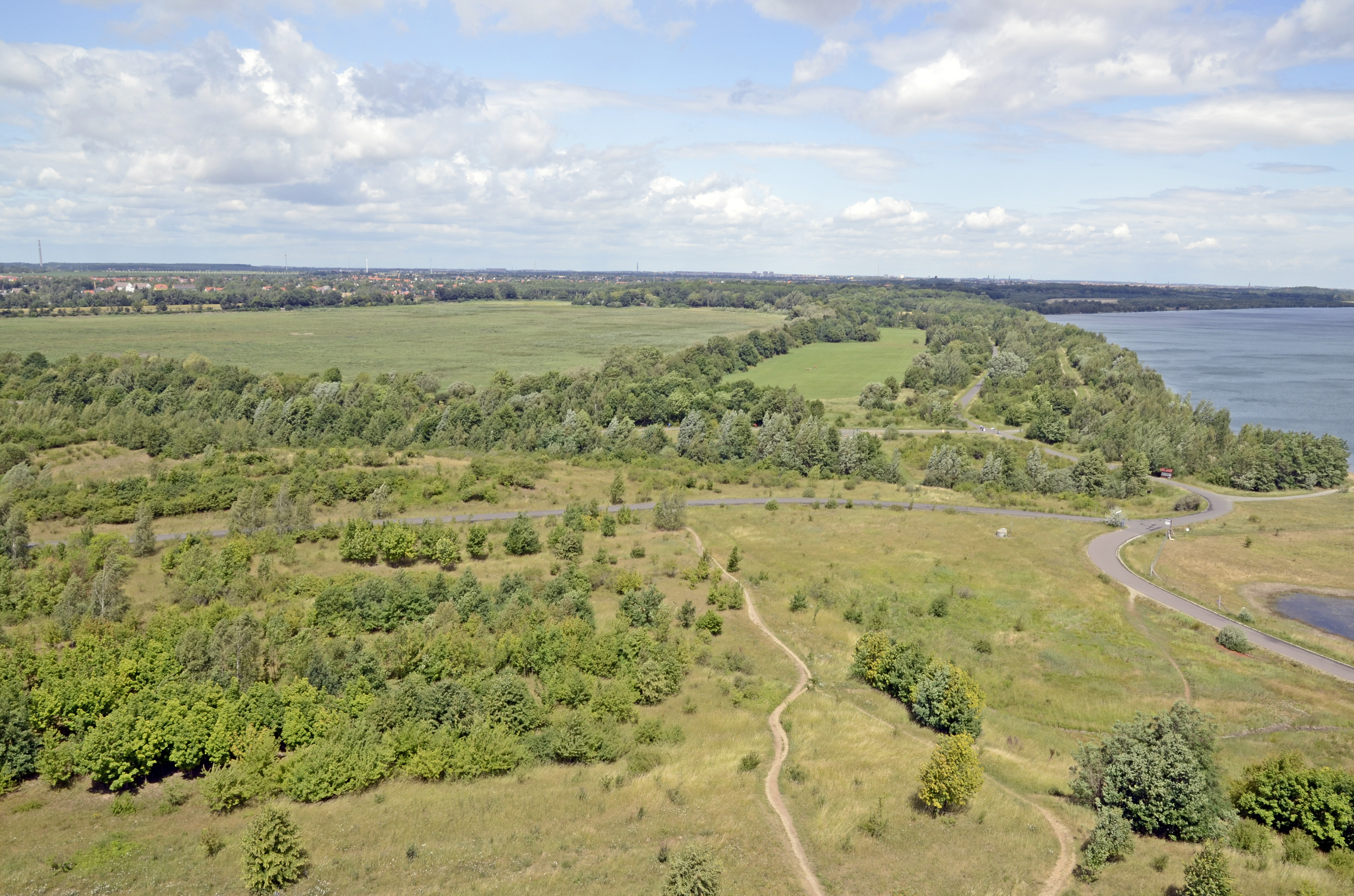 Elsterstausee, links, trocken, rechts davon der Cospudener See, Blick von der Bistumshöhe 2011